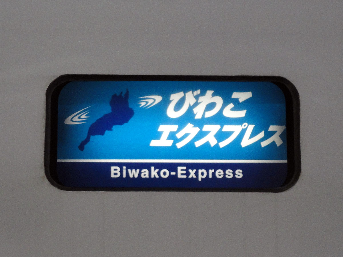 特急「びわこエクスプレス」方向幕